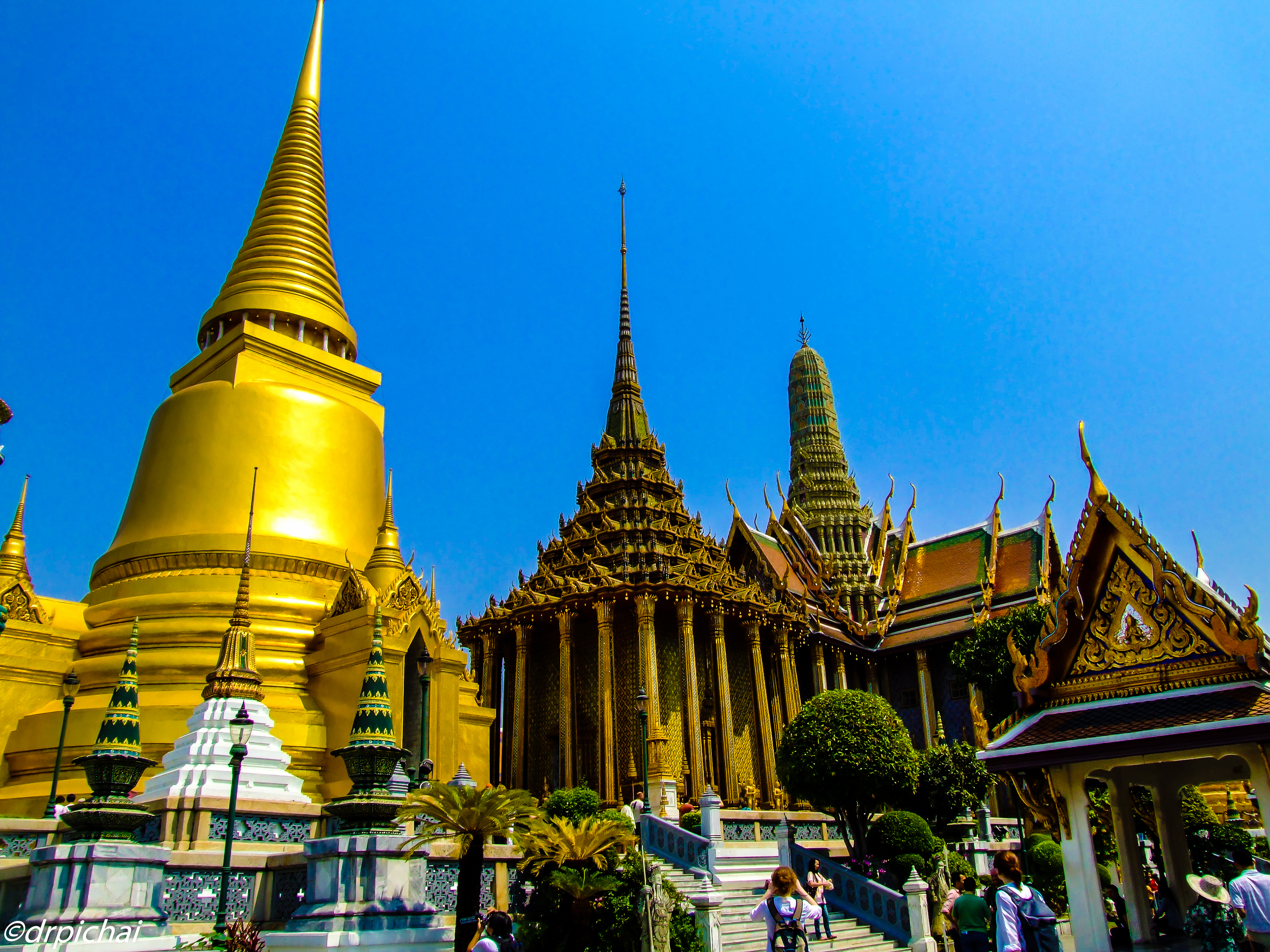 พระศรีรัตนเจดีย์ พระมณฑป และปราสาทพระเทพบิดร